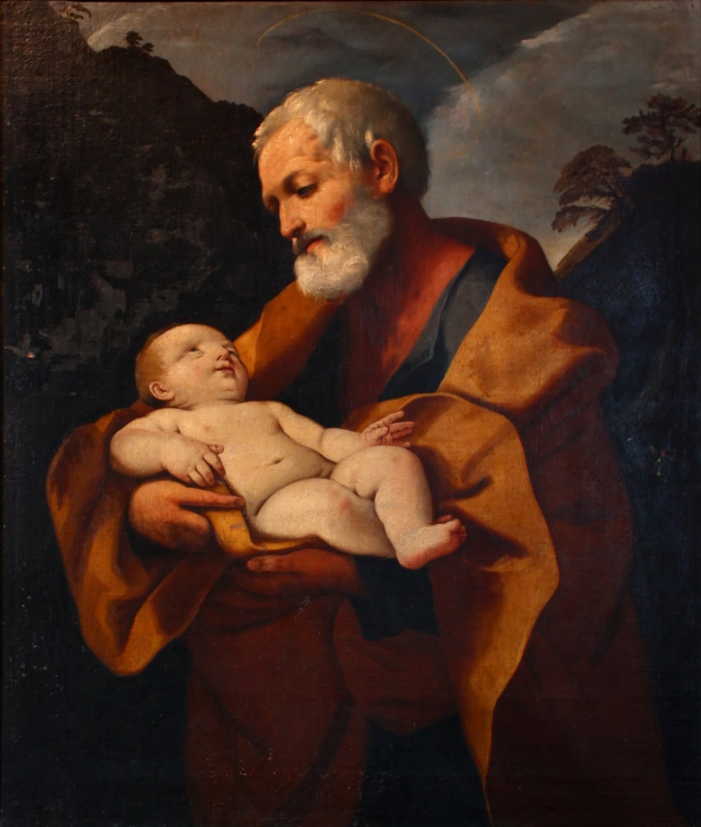 Saint Joseph portant le christ. Basilique Saint Jean et Paul, École vénitienne (Première décennie du XVIe siècle.) Autel de Saint-Joseph